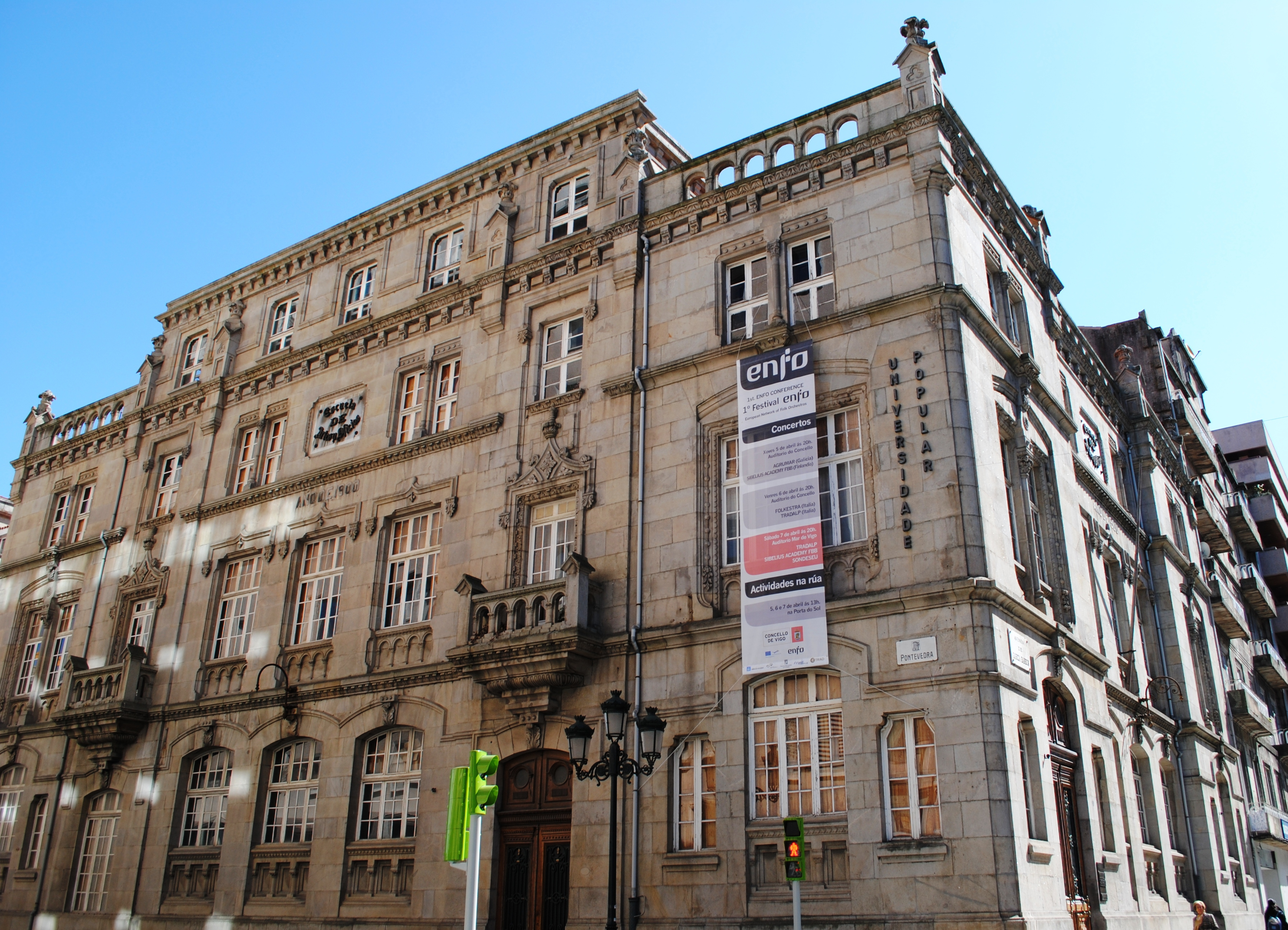 Escola de Artes e Oficios, ano 1900, Vigo